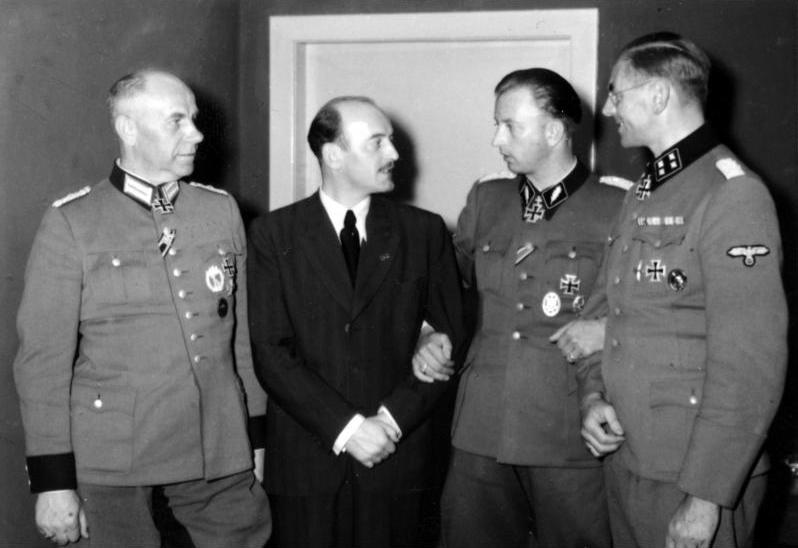 Funkhaus: "Fortsetzung folgt" Berlin, 24.5.42 Neue Ritterkreuzträger Giese [Griese], Goedicke, SS Sturmführer Fegelein, Pannier